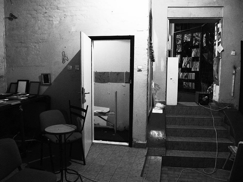 Die "Kunst-Klinik" ("Art Klinika") mit der "Schock-Galerie" (Šok galerija) in der Grčkoškolska 5 in Novi Sad